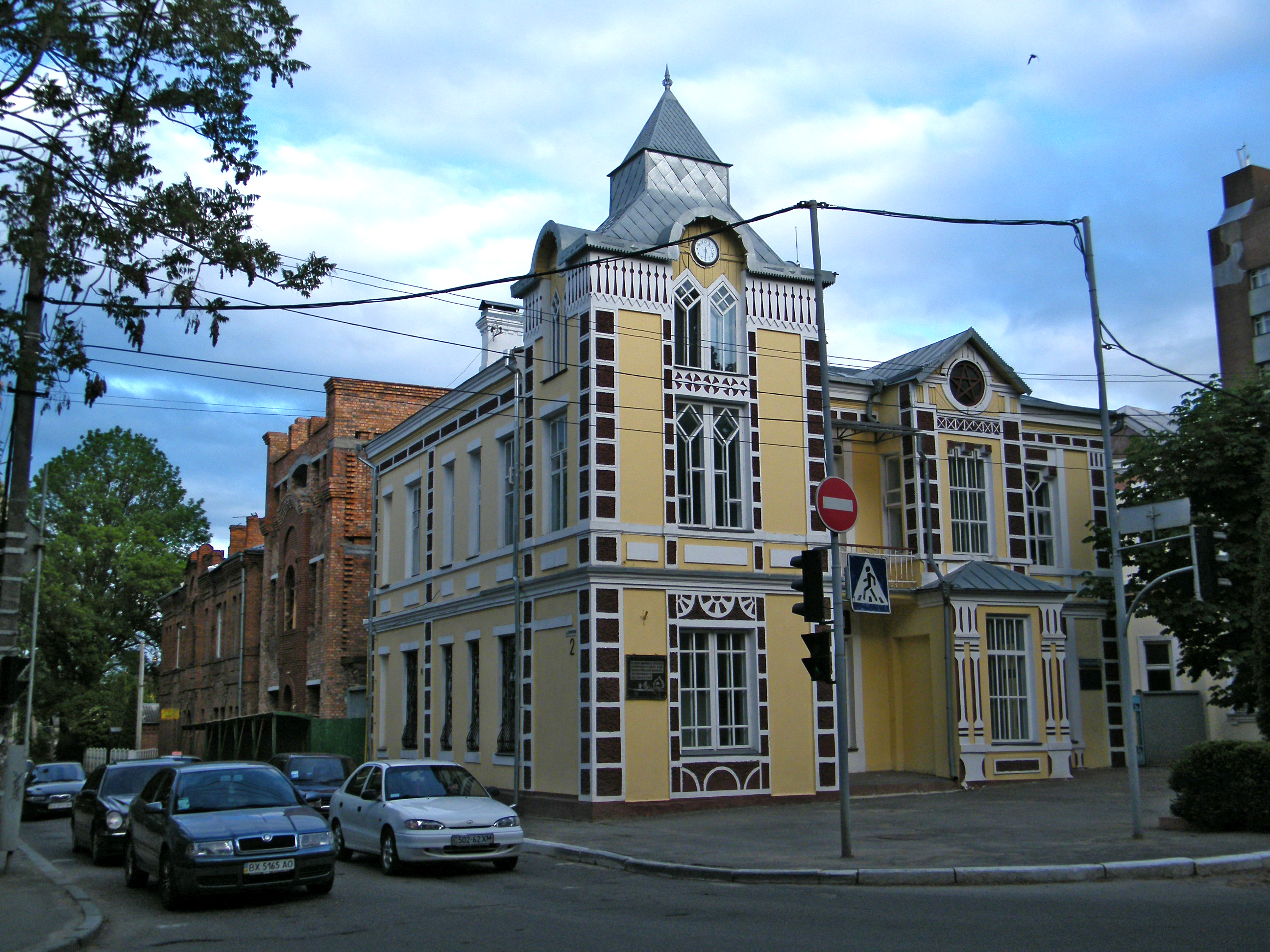 Здание на перекрёстке